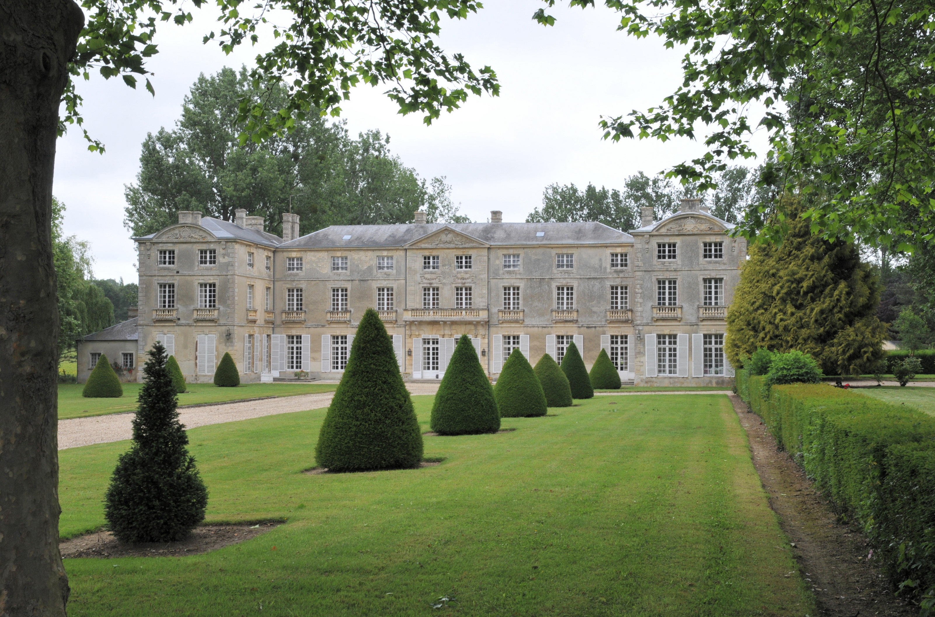 Schloss Vaussieux in Vaux-sur-Seulles, Calvados, Normandie; Ansicht von Süden